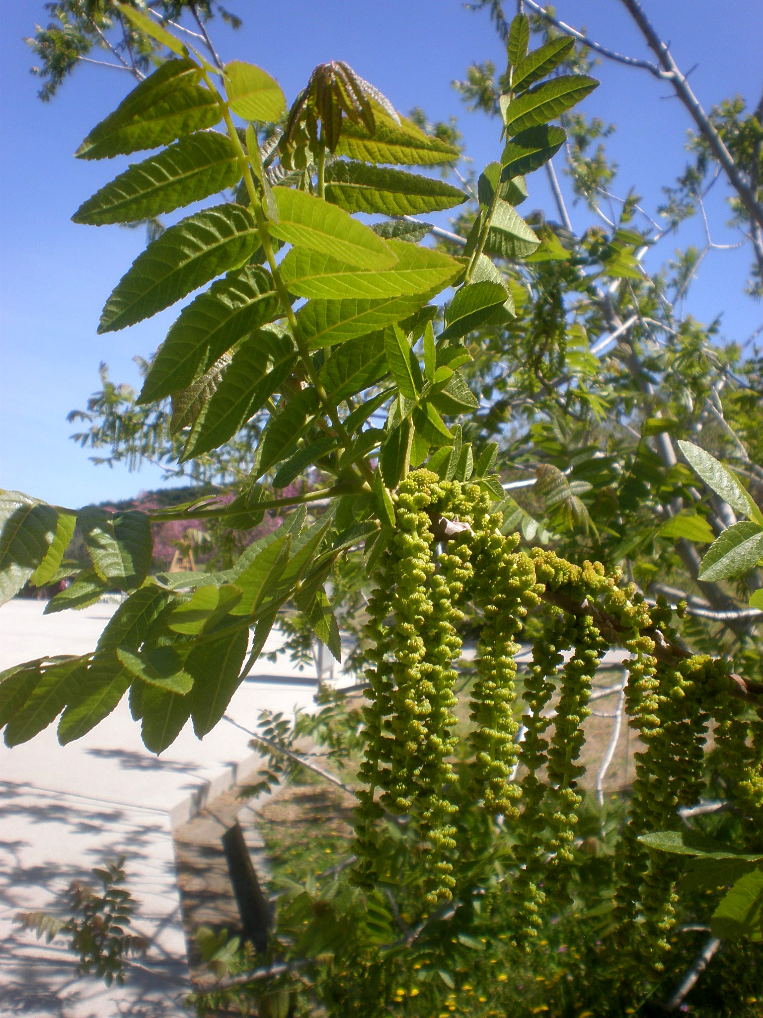 Jardín Botánico de Barcelona.